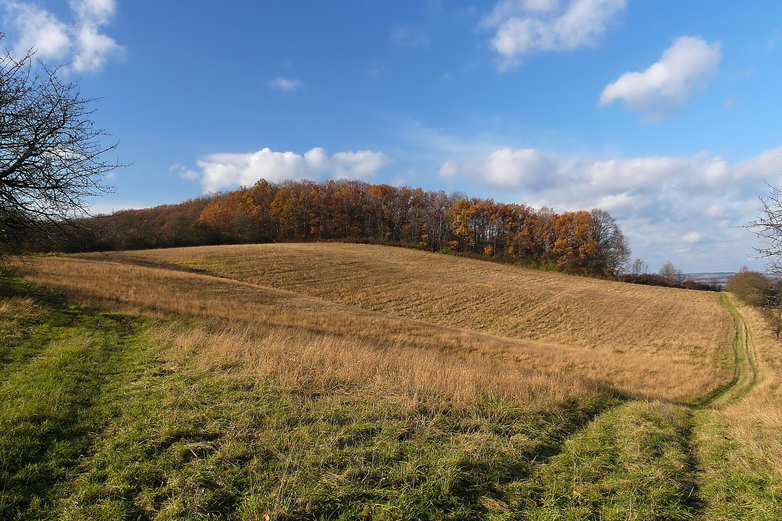 Pod Horkou, nad Dobrou Vodou